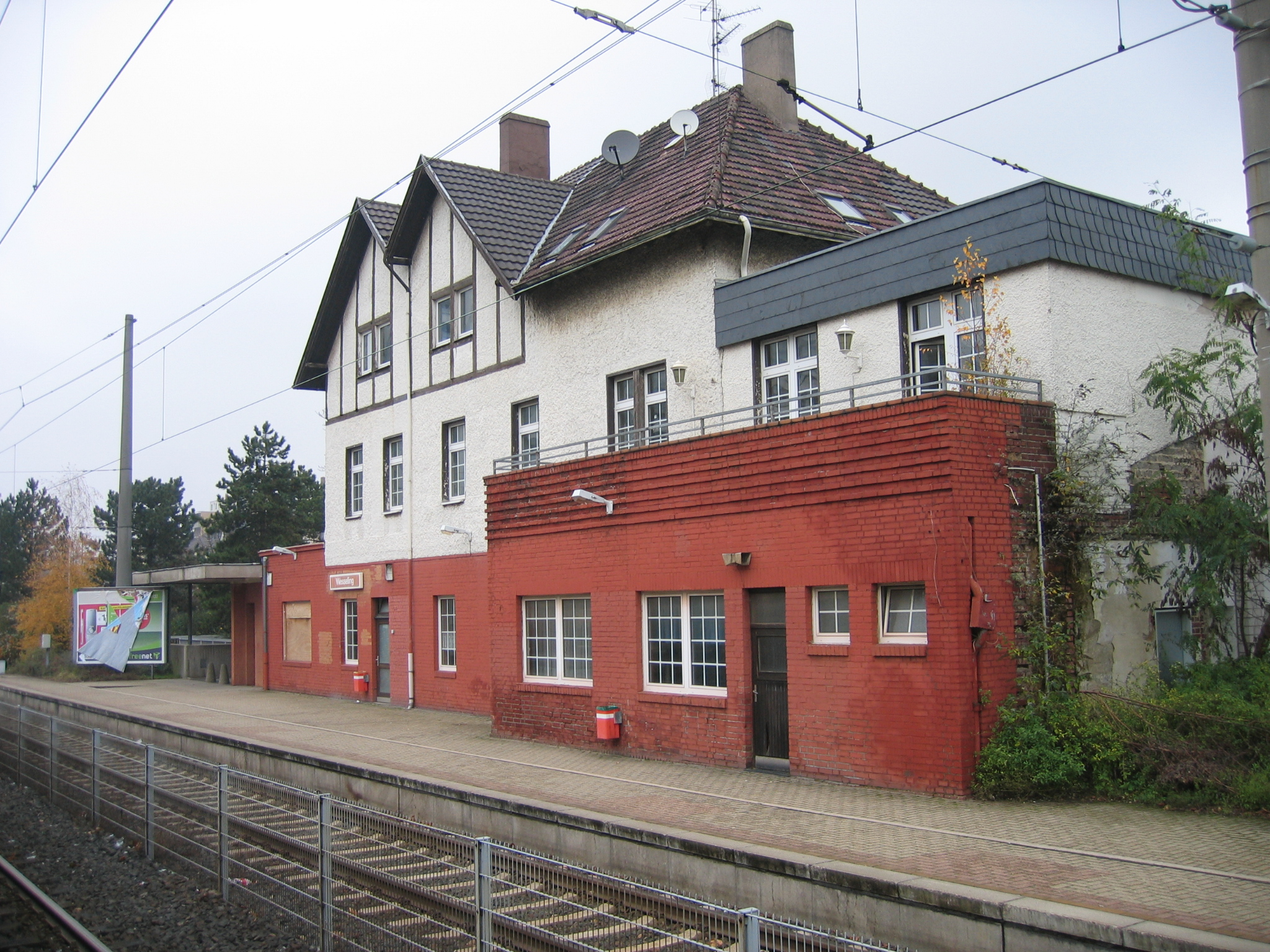 Haltestelle Wesseling der Kölner Stadtbahn, ehemaliges Bahnhofsgebäude